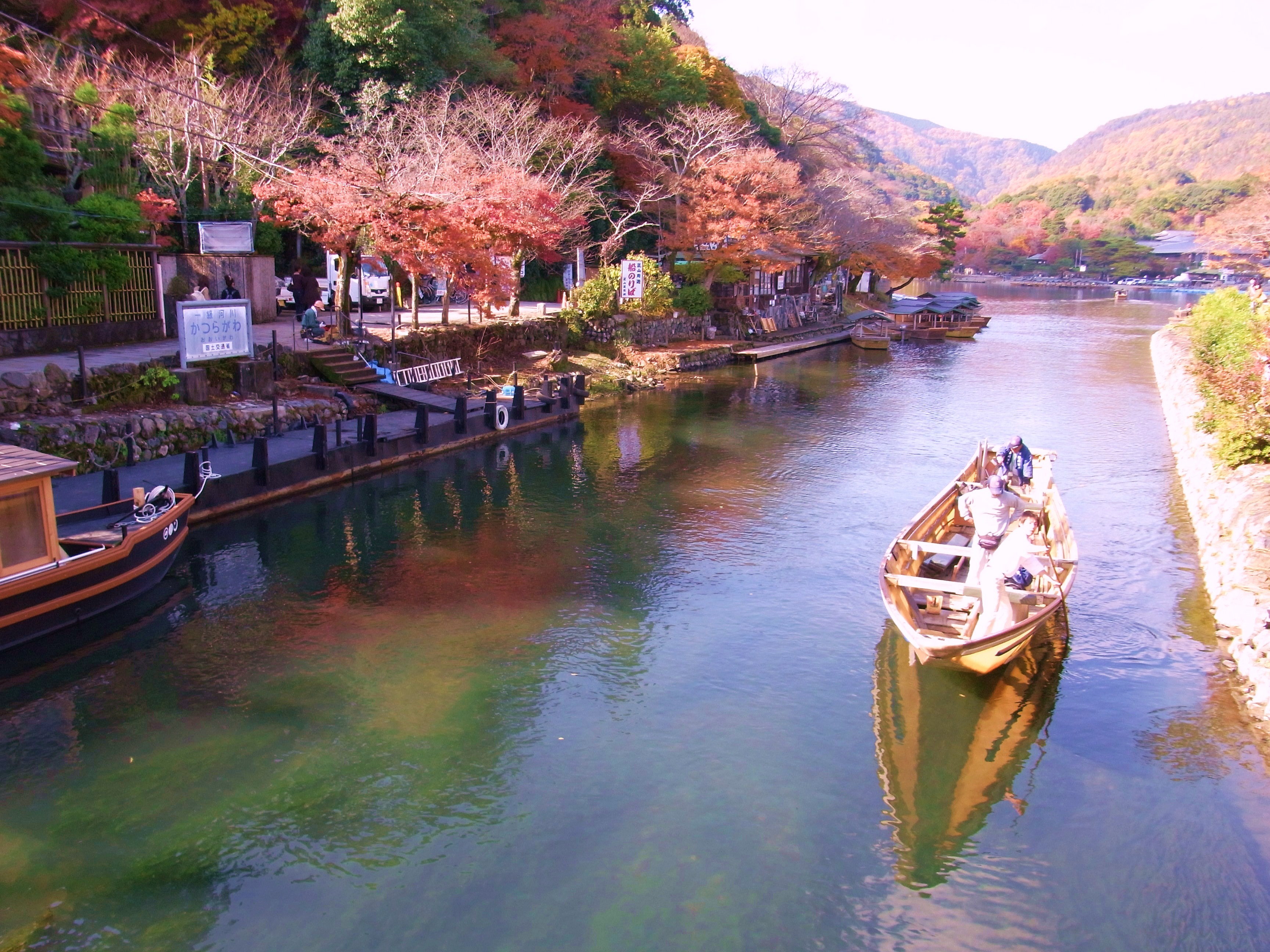 渡月橋 嵐狭めぐり乗場